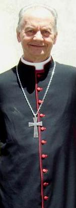 La foto è mia. Concedo tutti i diritti.